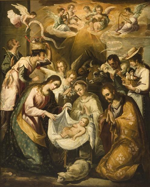 La obra representa el momento en que el Niño Jesús fue adorado por los pastores de Belén poco después de su nacimiento.